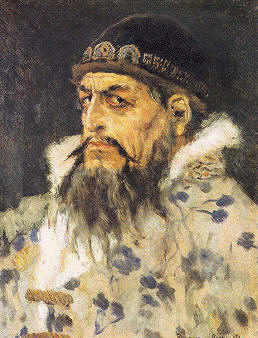 Etude for "Ivan IV"